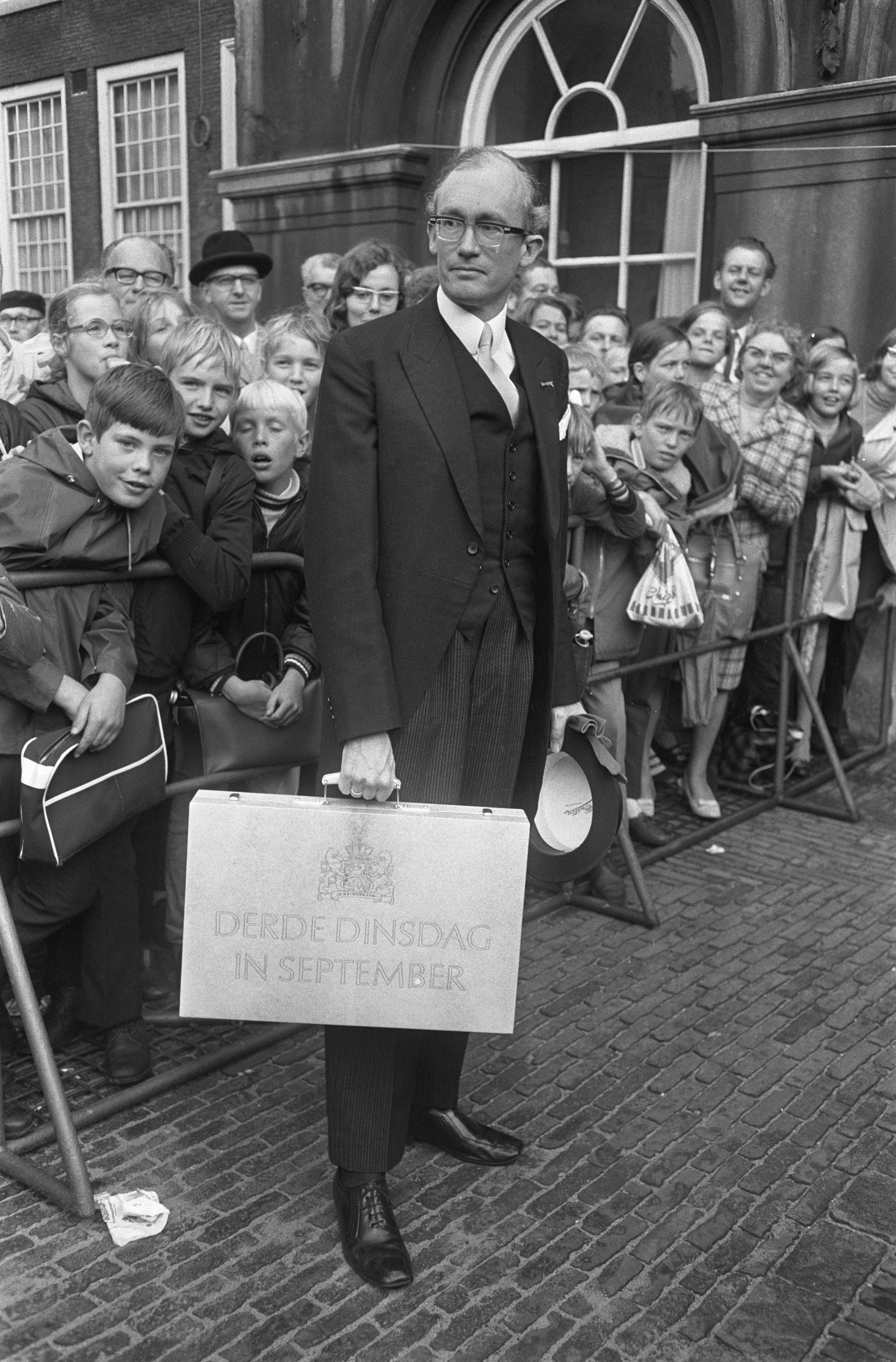 Minister van Financien Witteveen met de Miljoenennota bij de Tweede Kamer in Den Haag